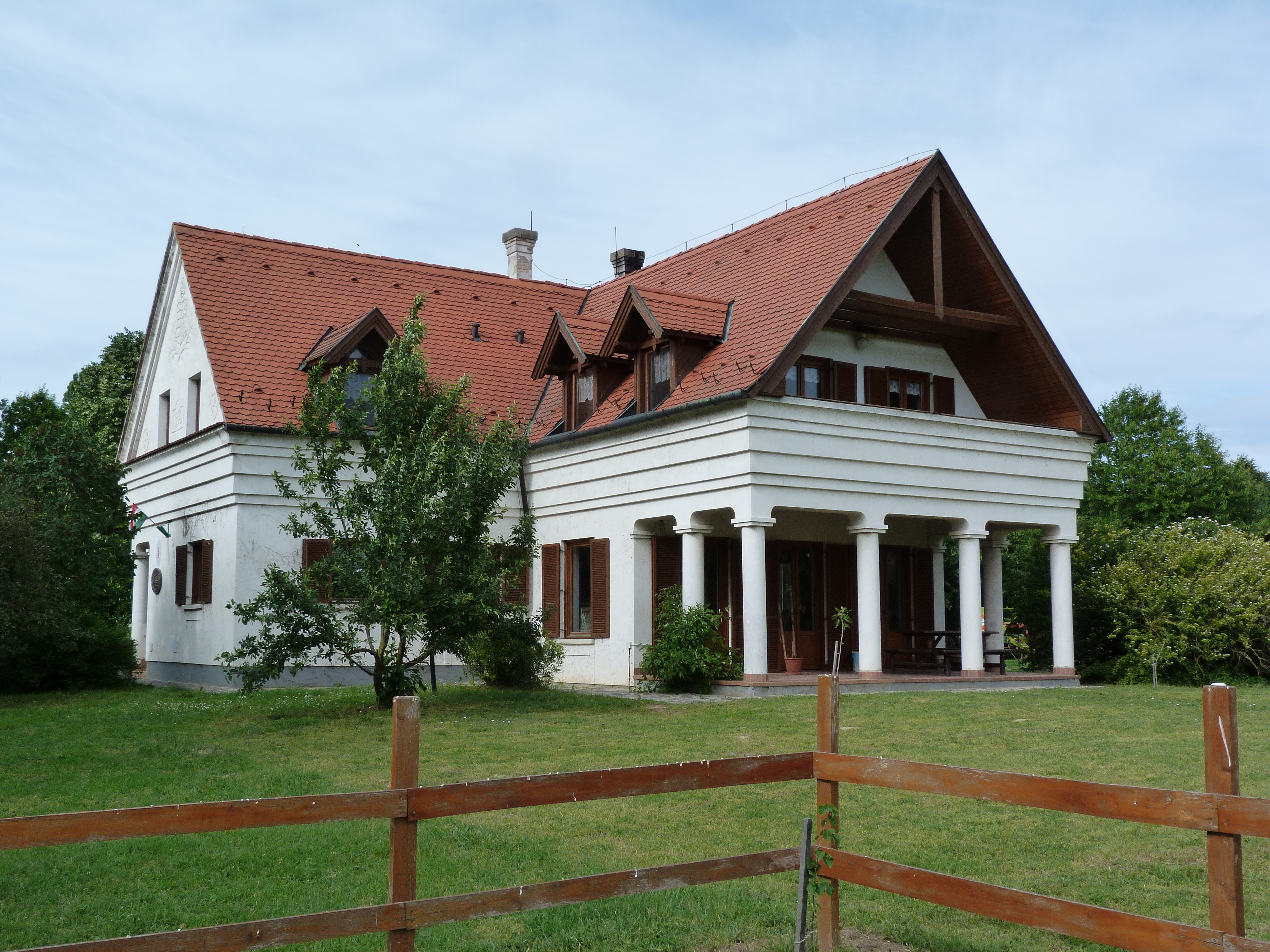 Jakab Vönöczky Schenk Research Building, Keszthely-Fenékpuszta, Balaton Uplands National Park, district Kis-Balaton.